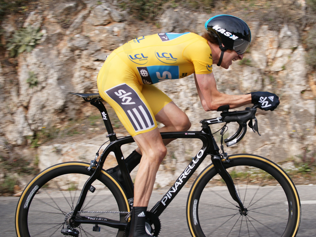 Bradley Wiggins, col d'Eze paris-Nice 2012